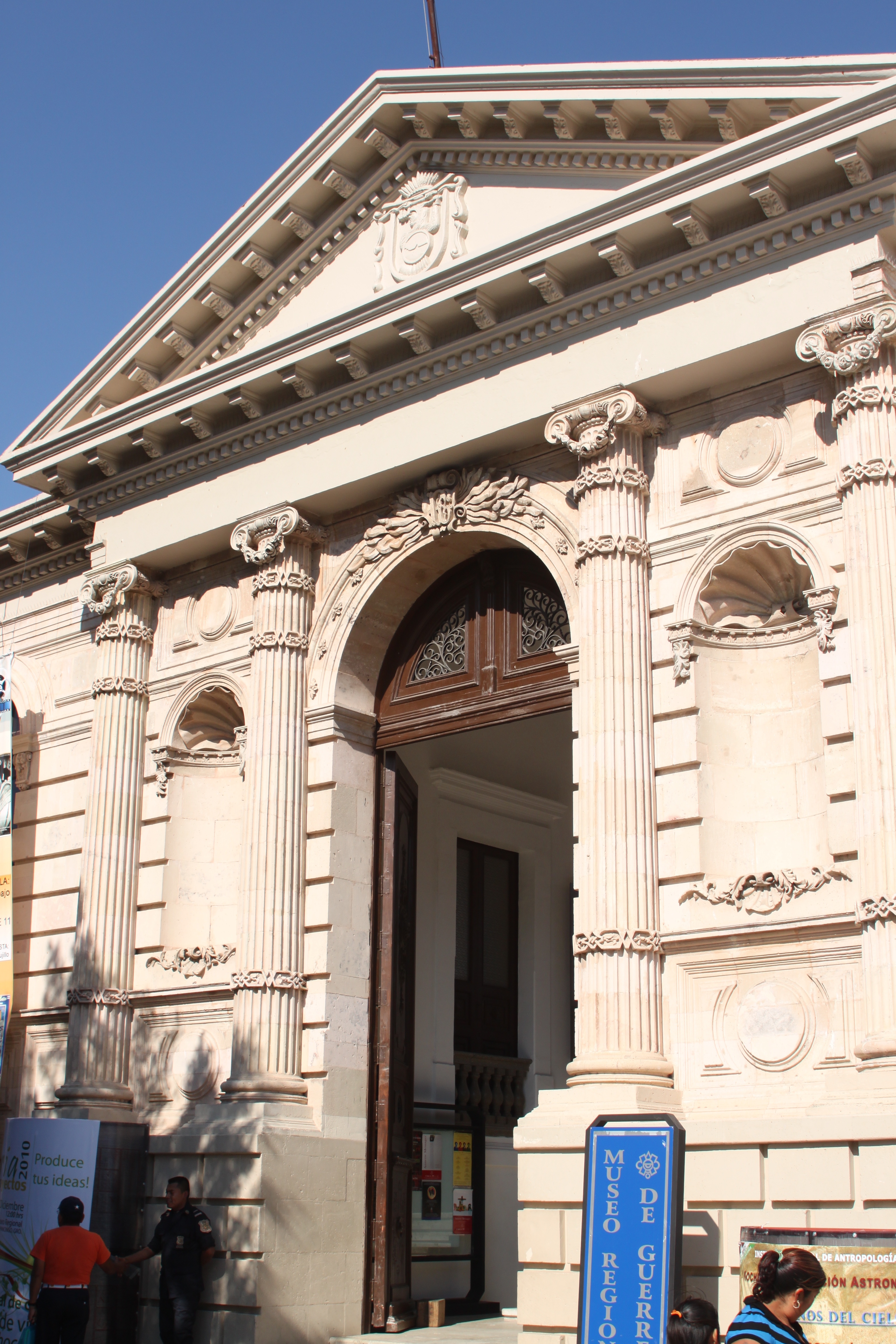 Antiguo Palacio Municipal.